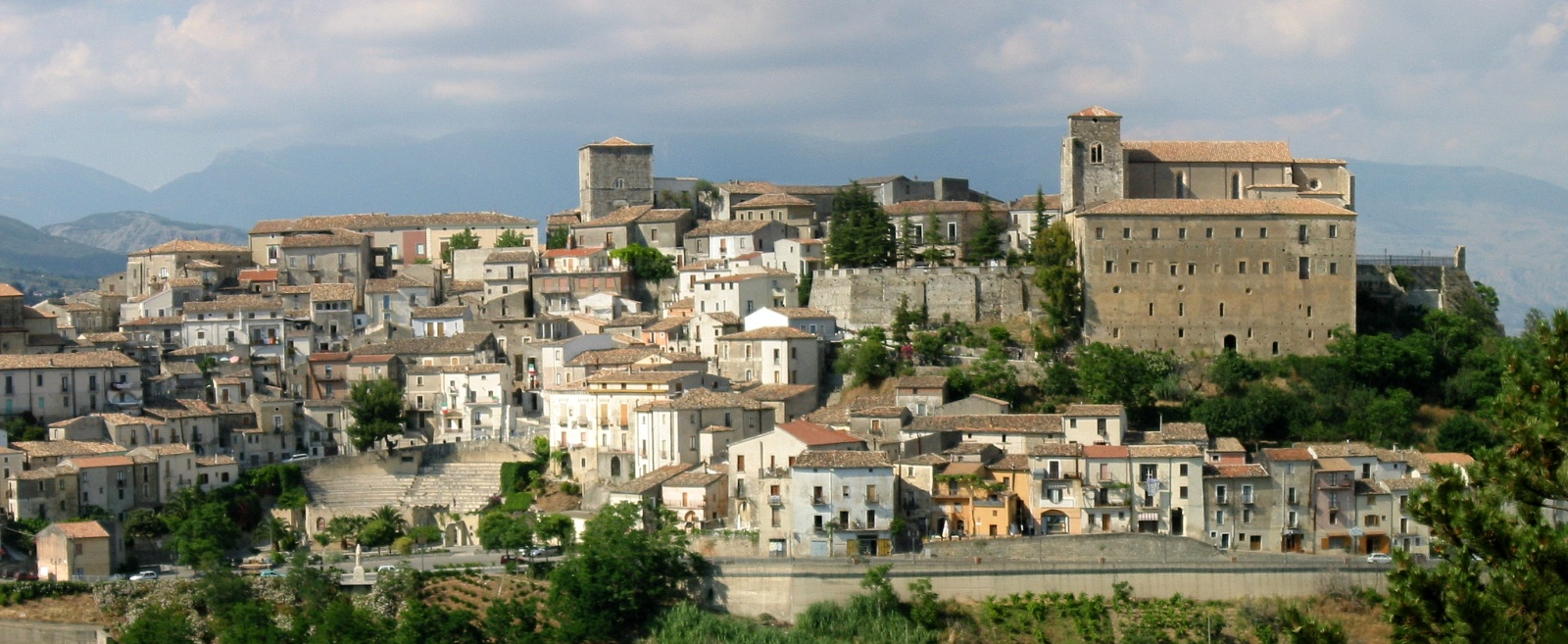 See title